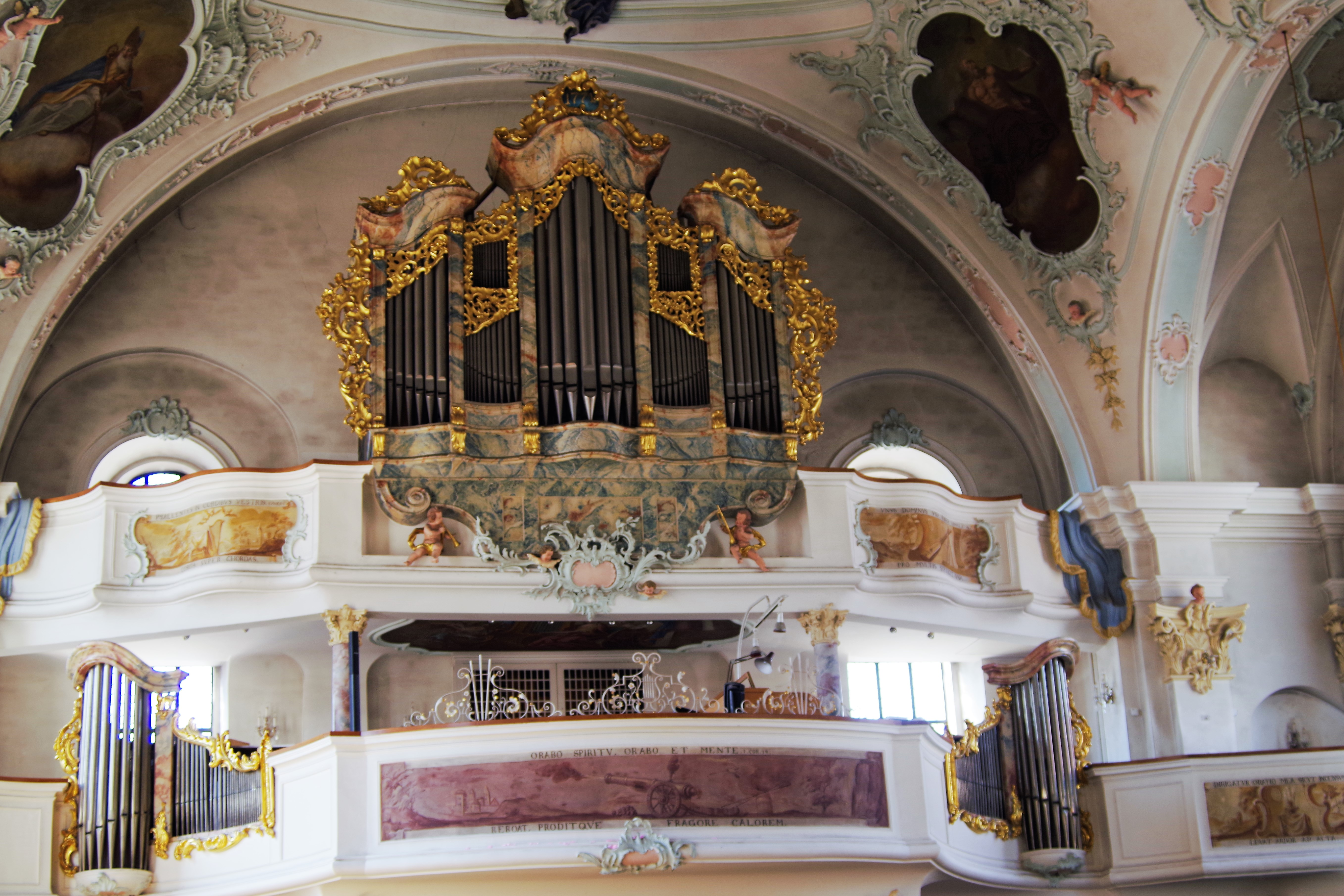 Orgelempore in der Kirche Maria Himmelfahrt WT-Tiengen